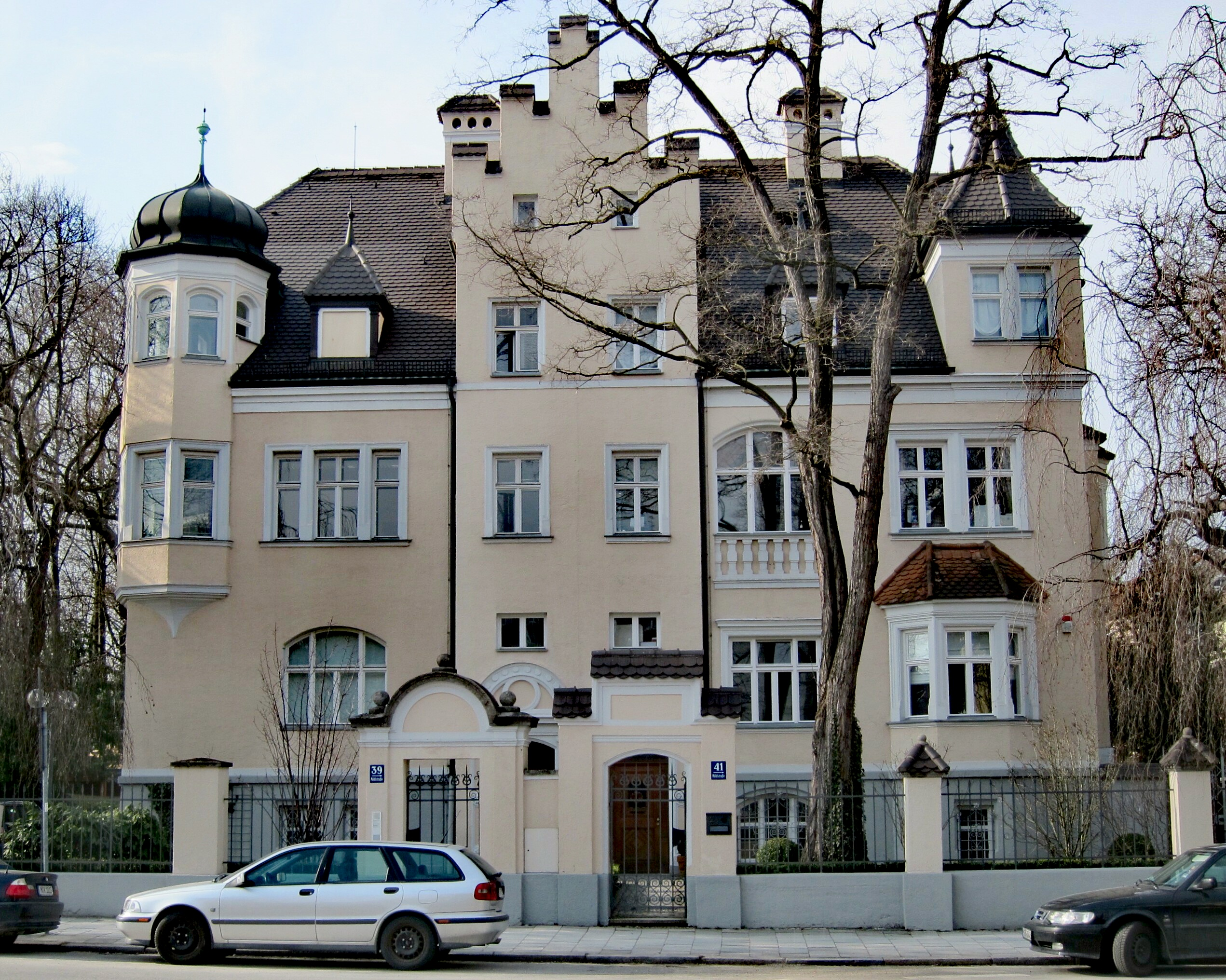 Möhlstr. 39 - 41; Malerische Doppelvilla mit Nr. 41, deutsche Renaissance mit gotischen Anklängen, 1897 von Leonhard Romeis für Georg Kerschensteiner, Nr. 41 für den Maler Ernst Ludwig Plaß (1855-1917); [1]